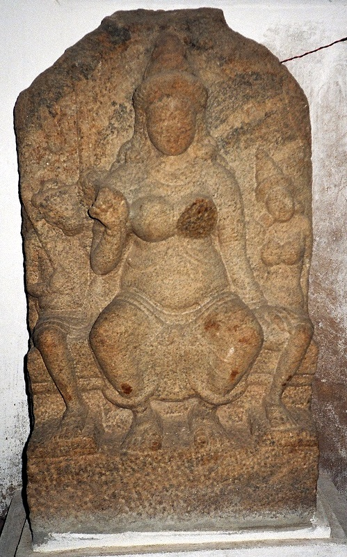 Jyeshtha